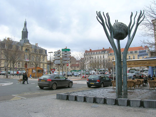 Sculpture Michel Granger Roanne